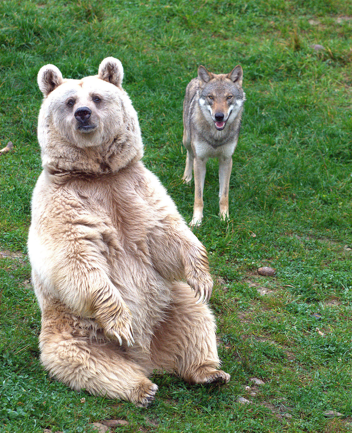 Bär und Wolf im Natur- und Tierpark Goldau